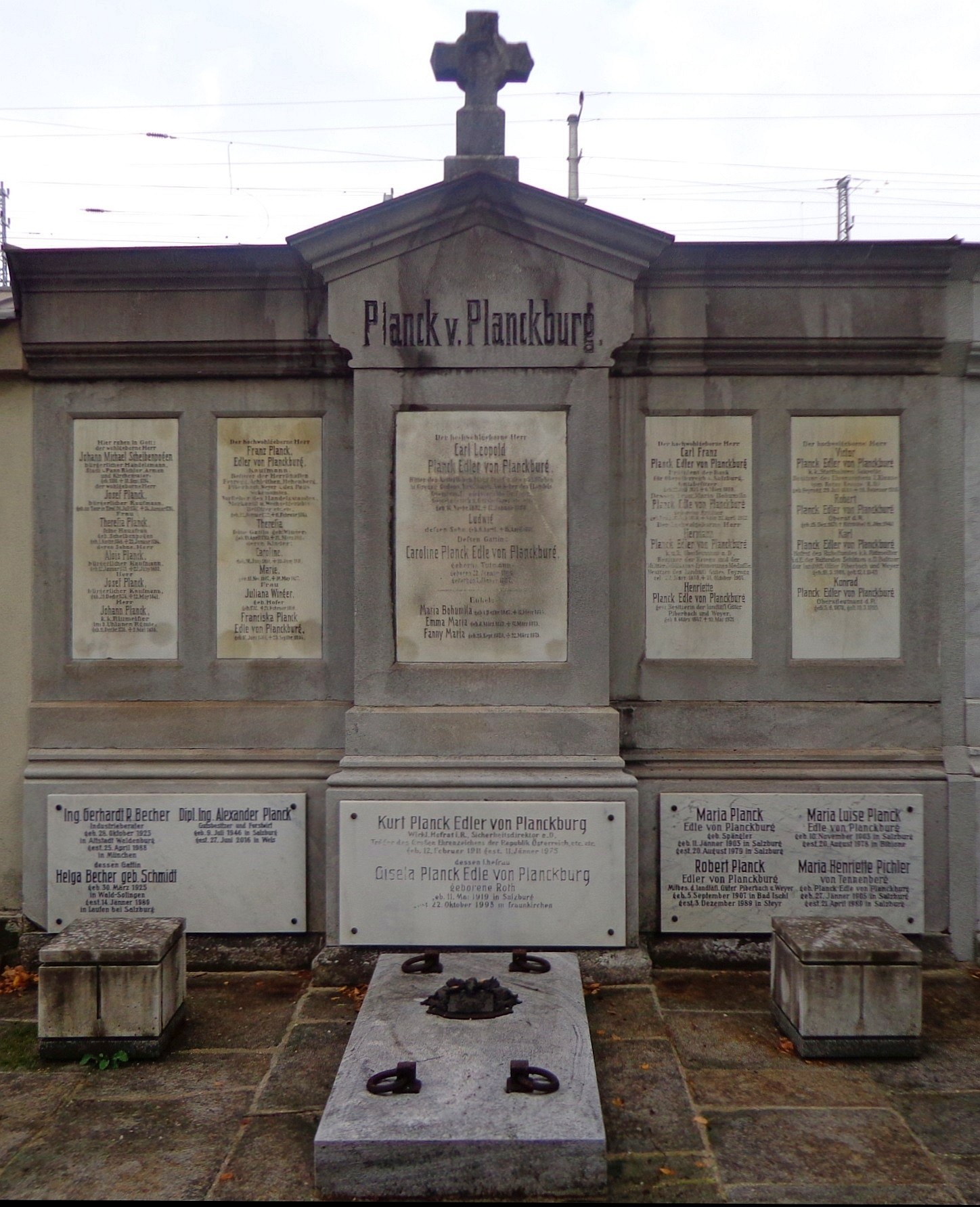 St. Barbara-Friedhof Linz - Grab der Familie Edle Planck von Planckburg